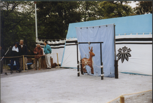 弓道, 弓術, 小笠原流, 草鹿式, Kyudo, Kyujutsu, Ogasawara-ryu, Kusajishi seremony.